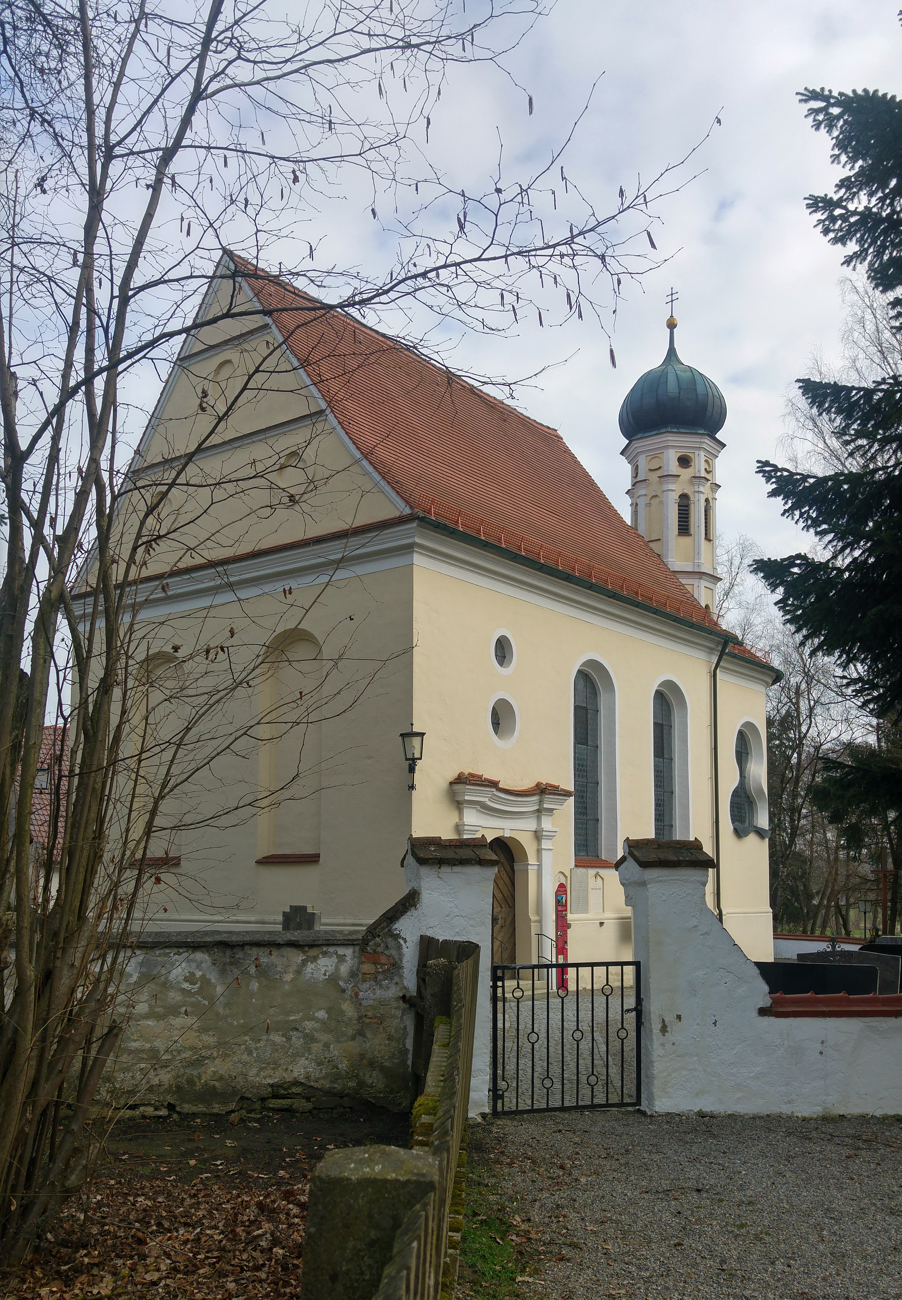 Baudenkmäler in Kühbach Aktennr. D-7-71-144-9